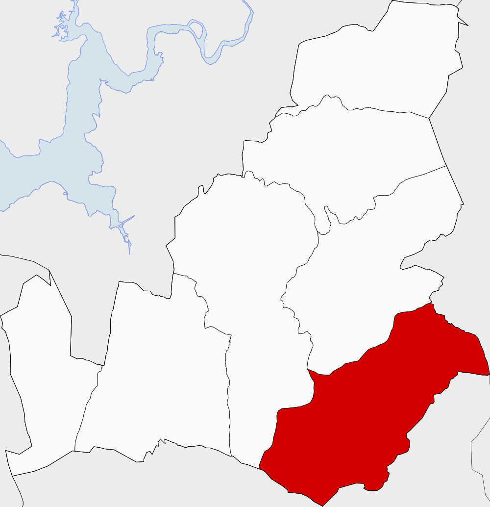 Extensión de la parroquia de Fruíme en Lousame